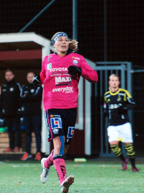 a_41_0077